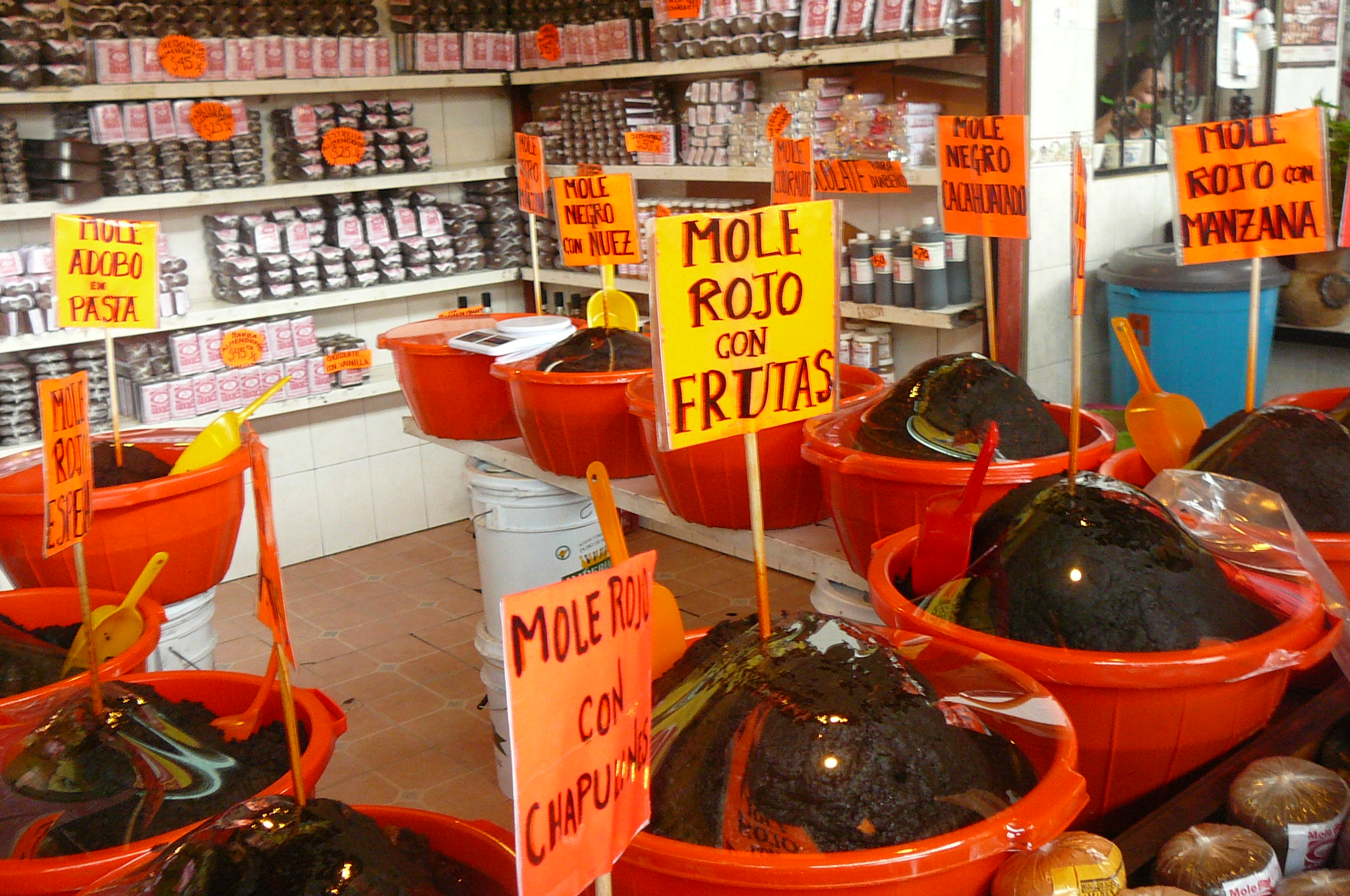 Au marché de Oaxaca, un commerçant propose de nombreux moles.